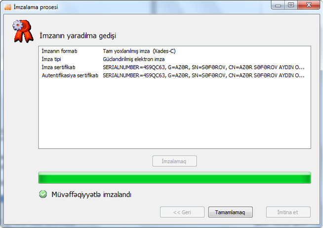 Elektron imza proqramı.